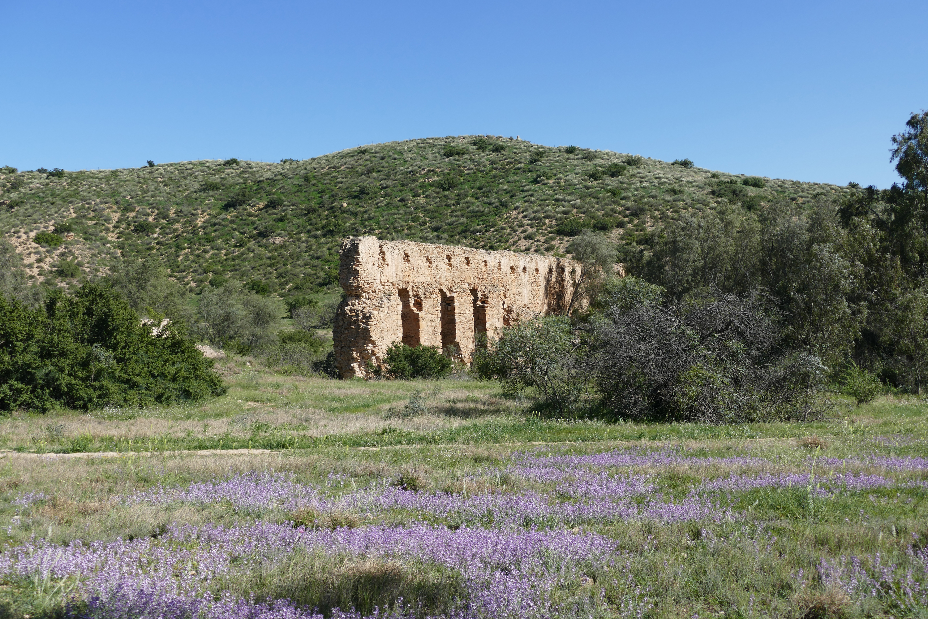 Réserve naturelle d'Ain Cherichira Aqueduc aghlabide et flanc de jebel